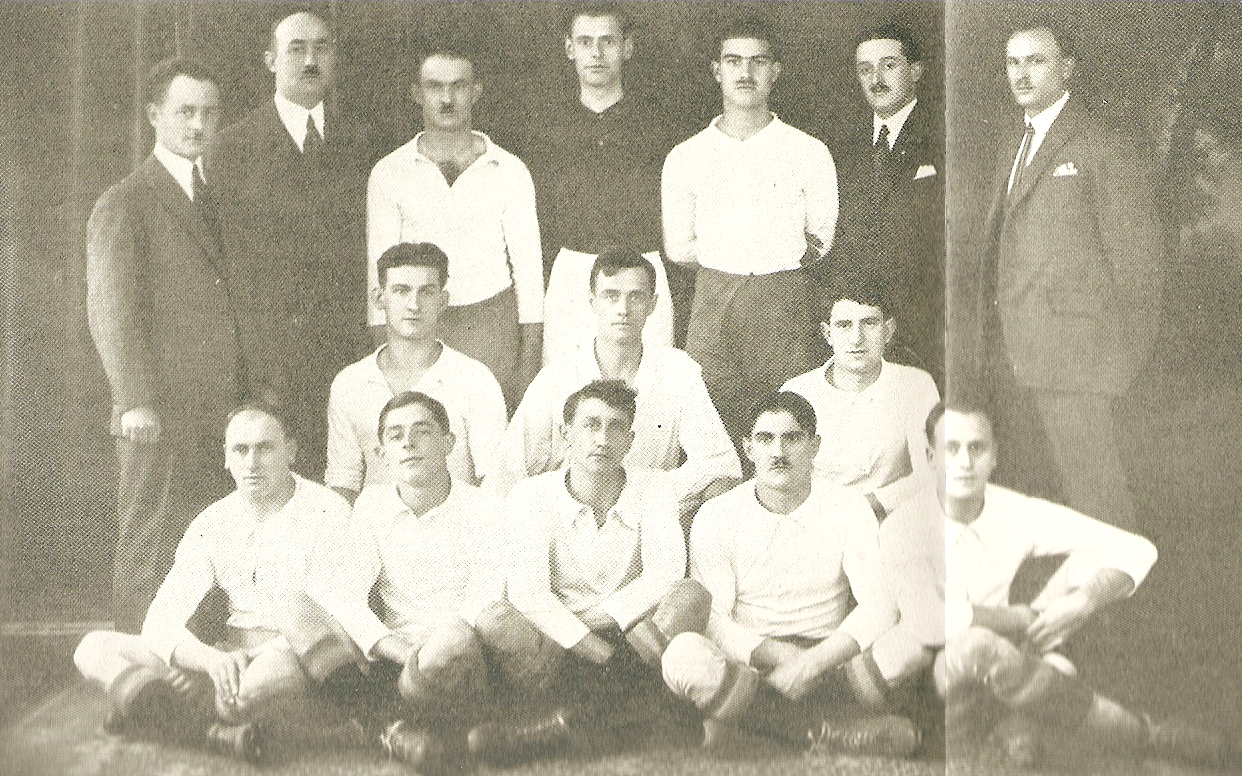 RC Strasbourg champion d'Alsace 1922-1923, série honneur. De gauche à droite, Debout : Ed. Wuileumier, Ch. Belling, Hiltenbrand, Meyer, M. Weber, H. Tubach, Fr. Schaeffer. Second plan : Schroeder, Ch. Wyss, Lacker. Devant : Ch. Schaeffer, Freyermuth, Paul Wyss, Bronnimann, Willy Schaeffer.